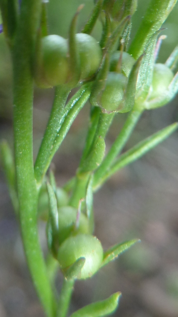 Fruits de la Linaire de Pelissier